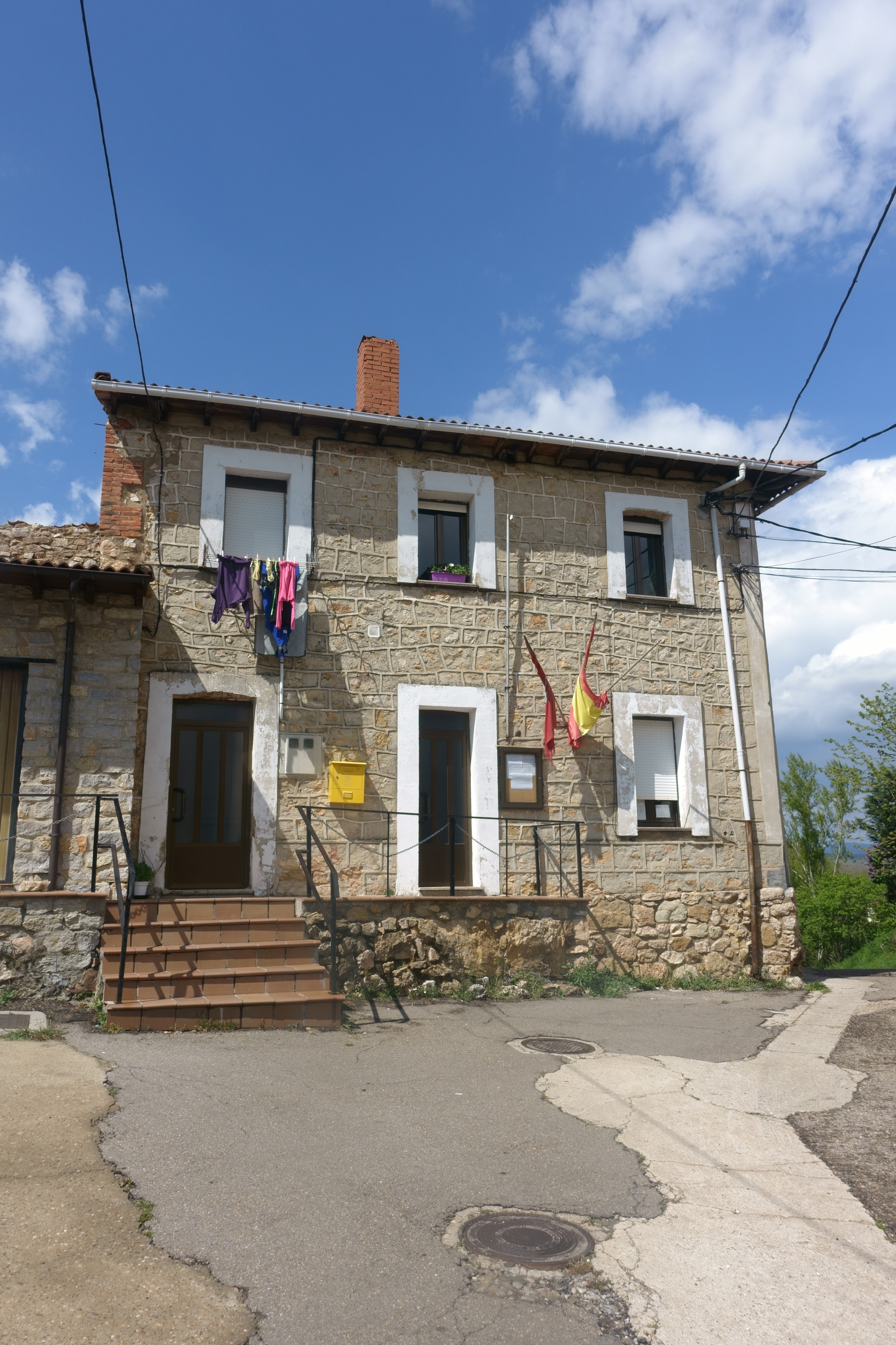 Casa consistorial de Prado de la Guzpeña (León, España).